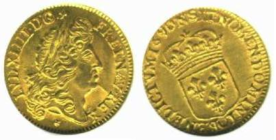 Photo de ma collection personnelle